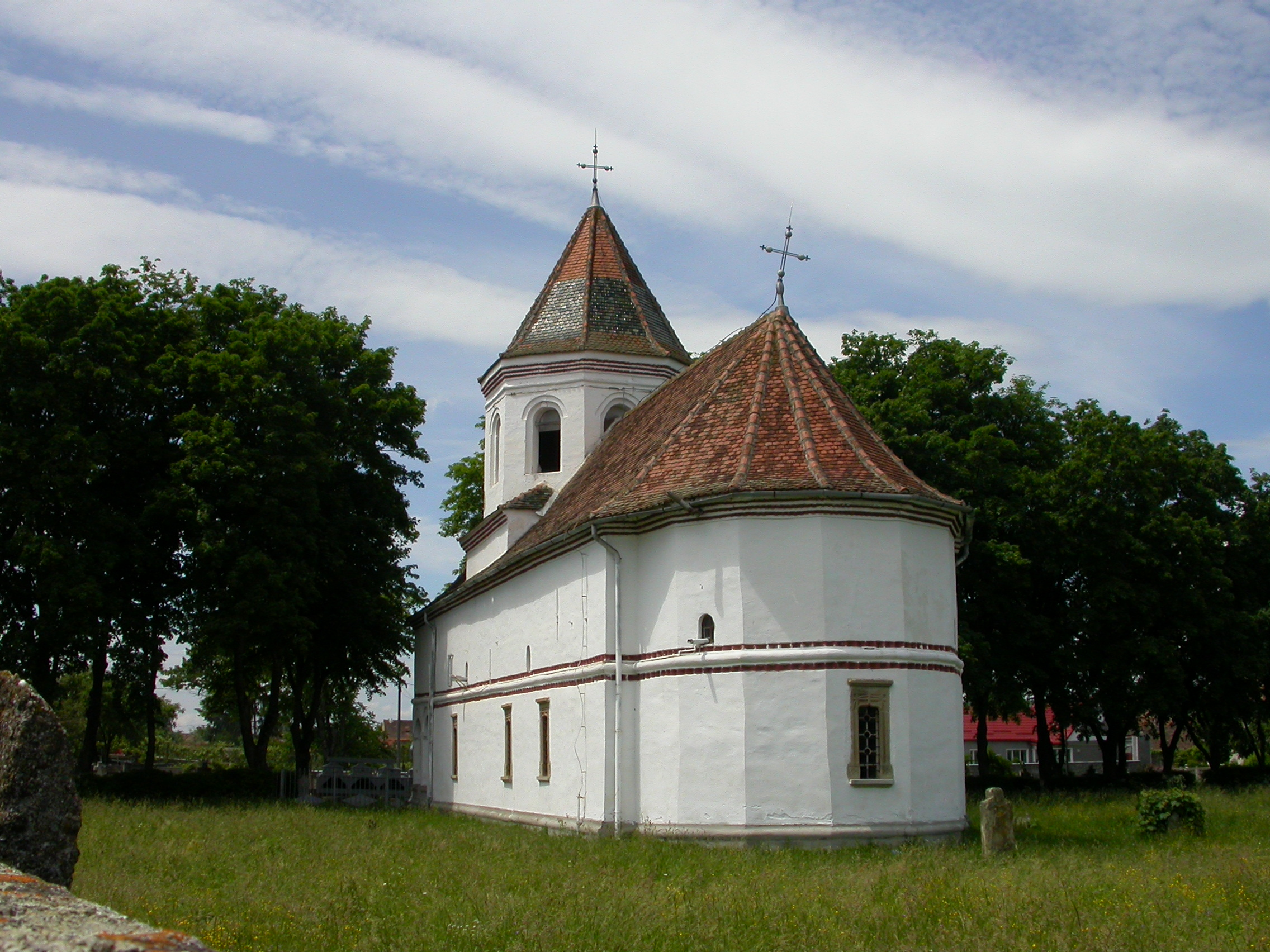 Biserica "Sf. Nicolae"- Brâncoveanu, 1697 - 1698